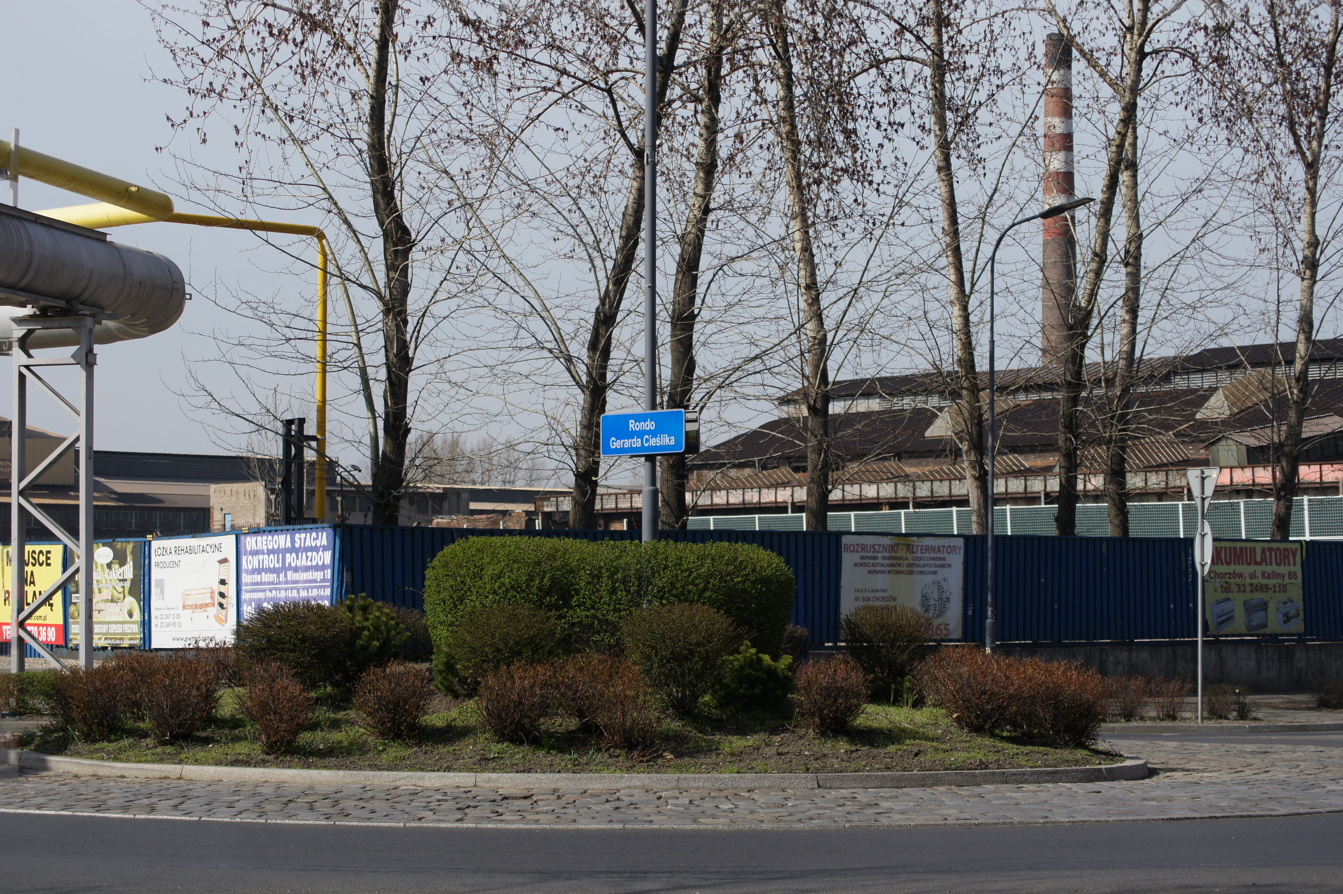 Rondo im. Gerarda Cieślika w Chorzowie